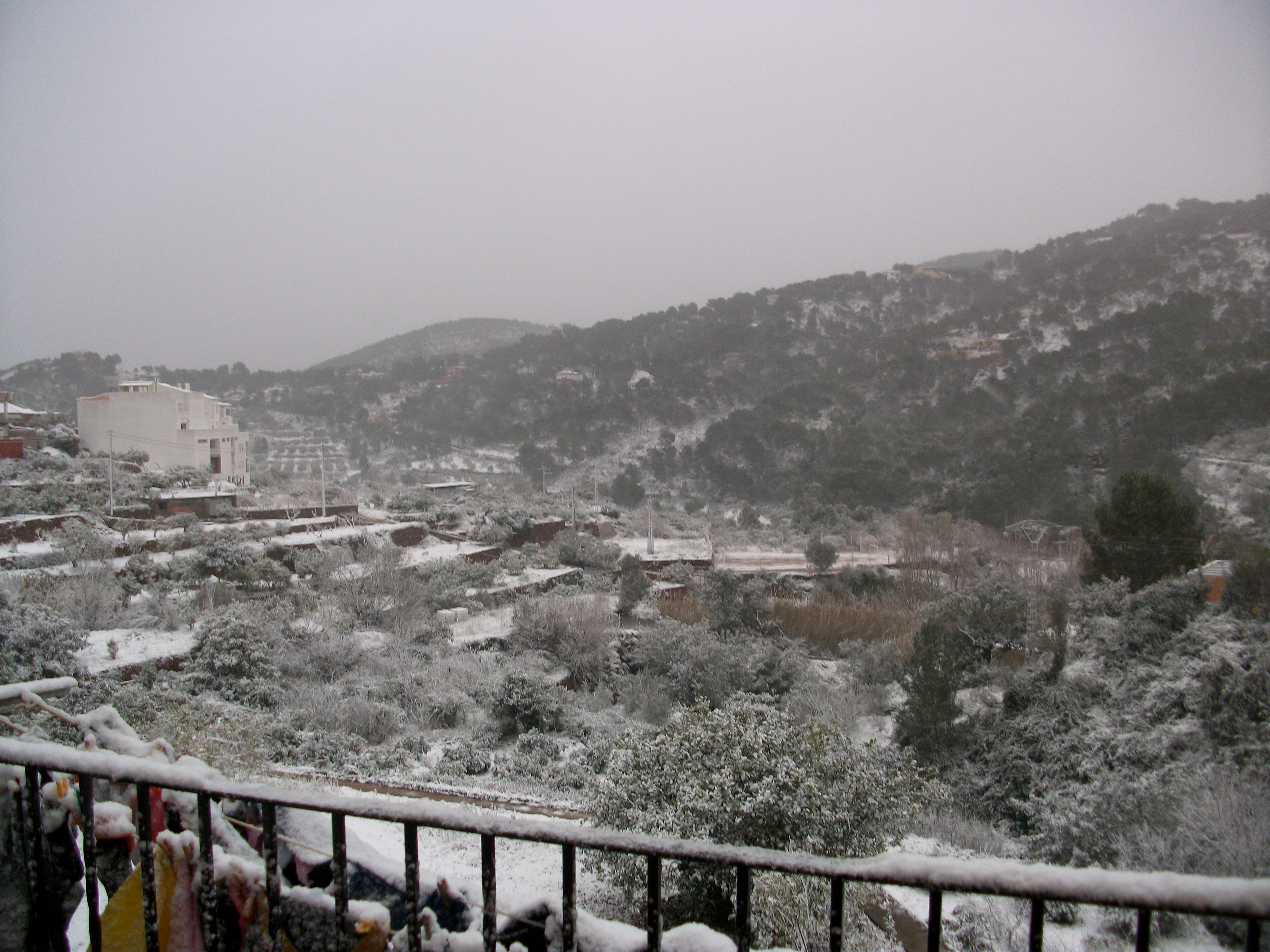 La imagen muestra la nevada caida en enero del 2010